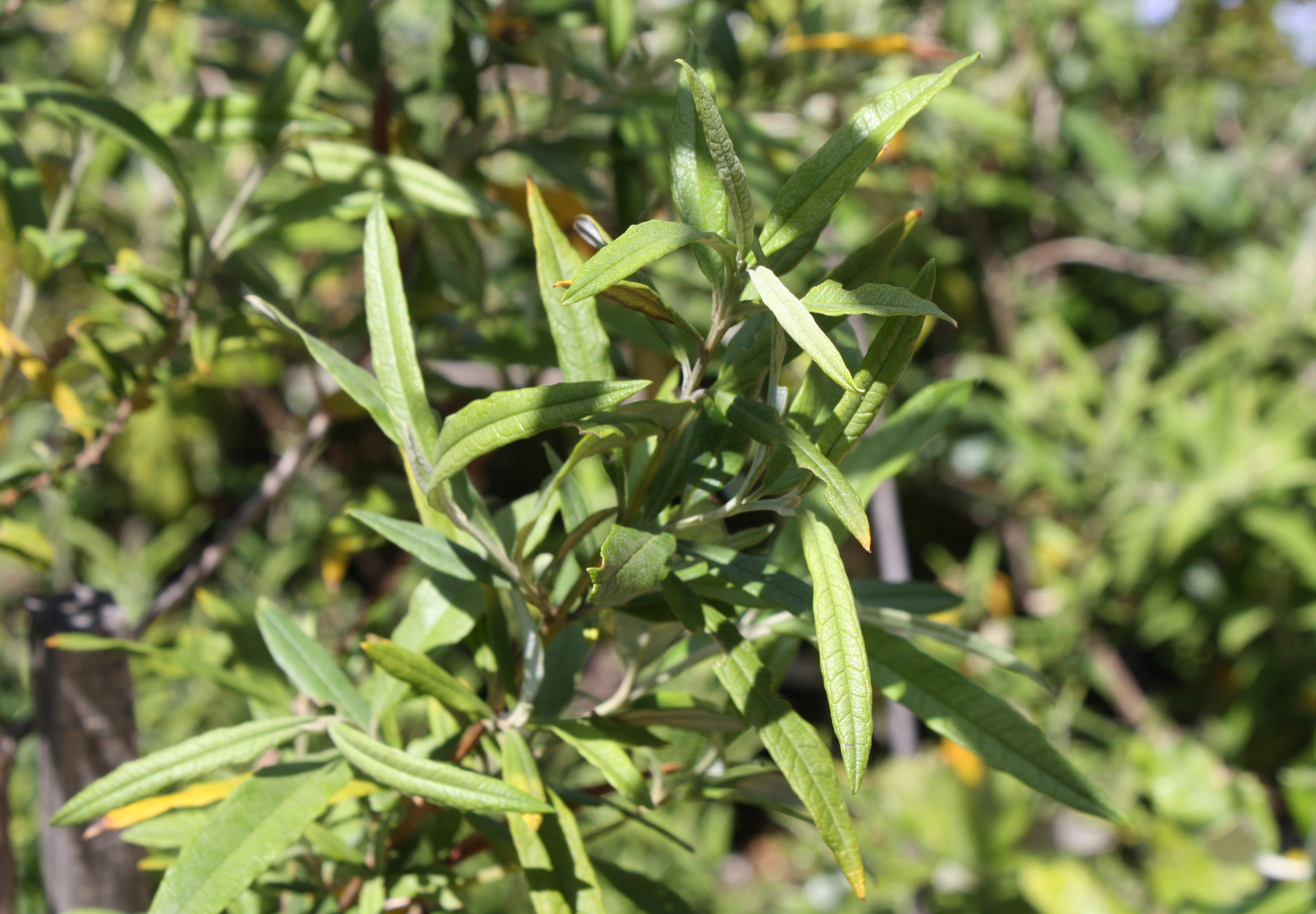 Foliage of Buddleja saligna